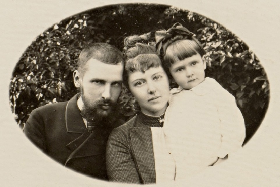 Пётр Аркадьевич Столыпин (1862-1911) с женой Ольгой Борисовной (1859—1944) и дочерью Марией (1885—1985)